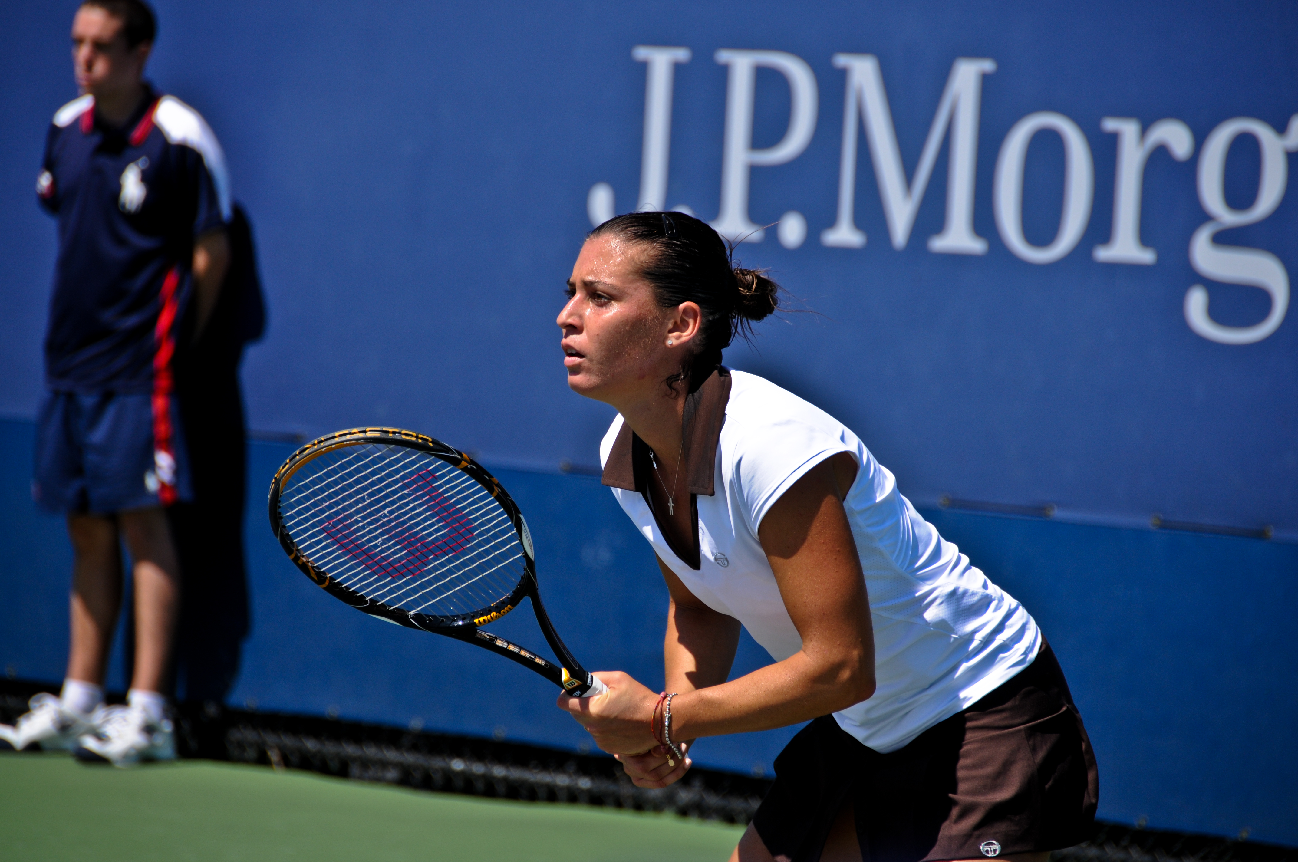 Flavia Pennetta durante gli US Open del 2008